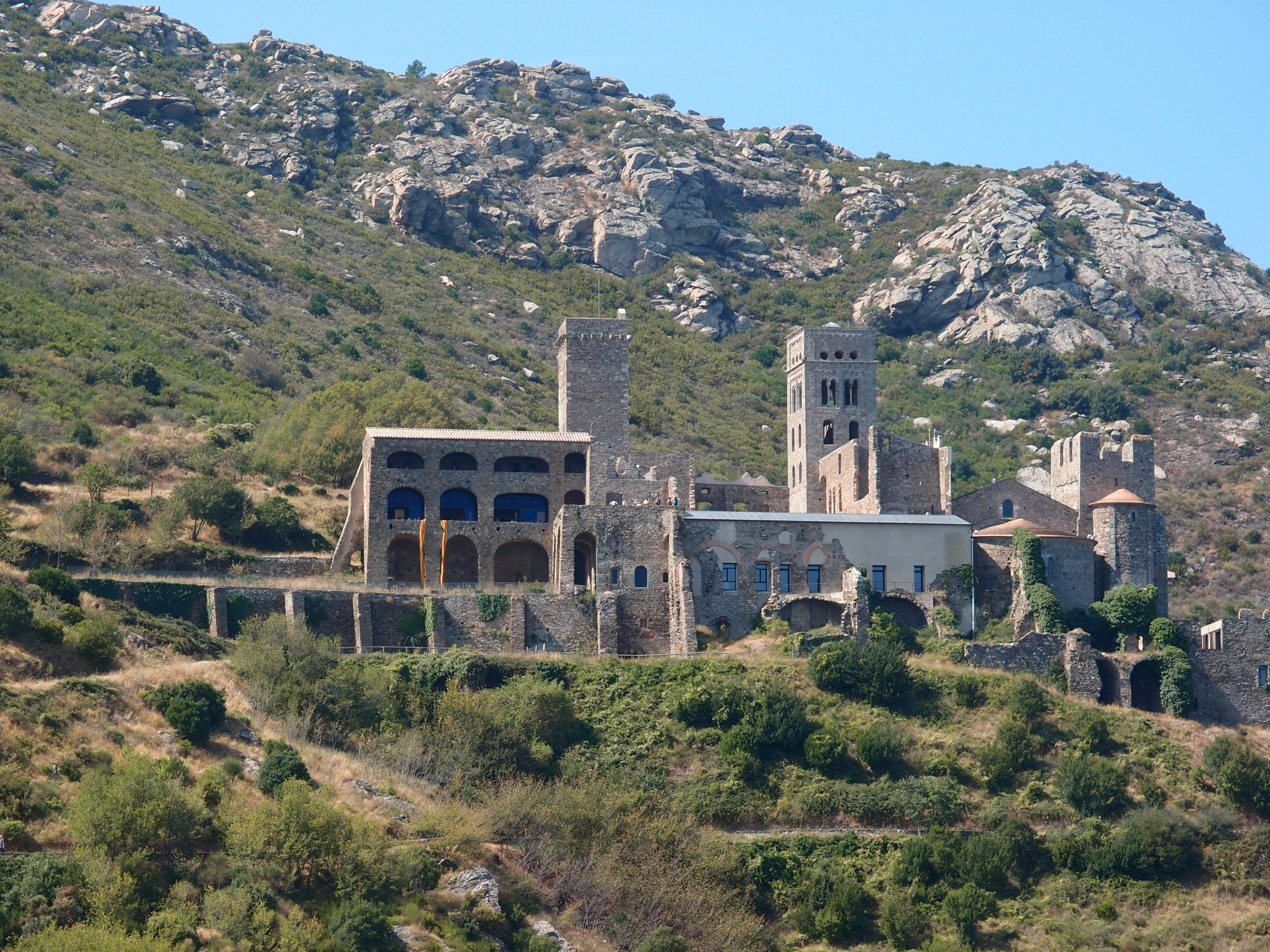 Monestir de Sant Pere de Rodes (Katalonien/Spanien) Datum: 11.09.2012 Urheber: Michael Pfeiffer alias User:Gordito1869 Quelle: privates Fotoarchiv des Urhebers(Katalonien/Spanien)